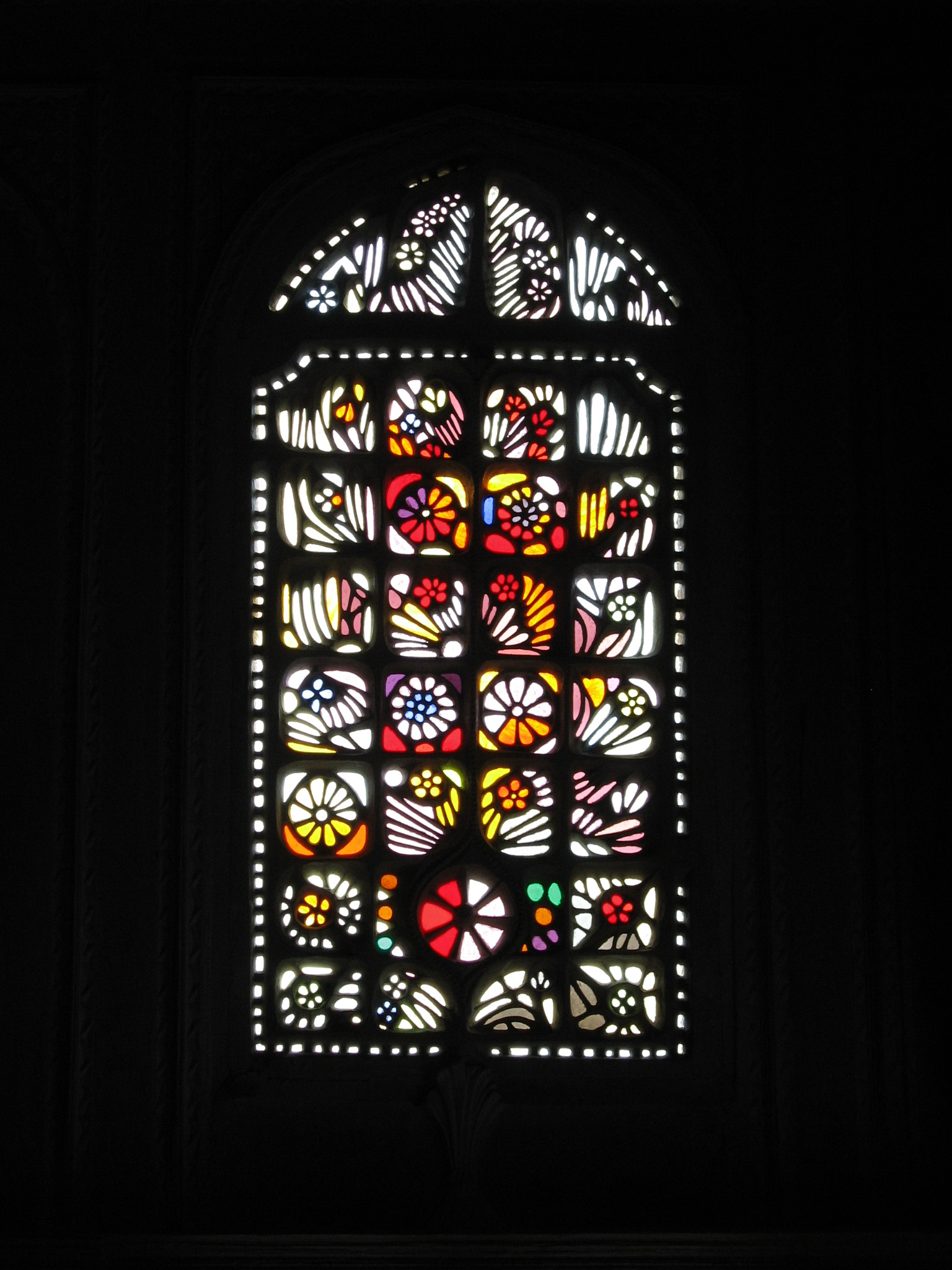 Kordopulovhuis - Melnik